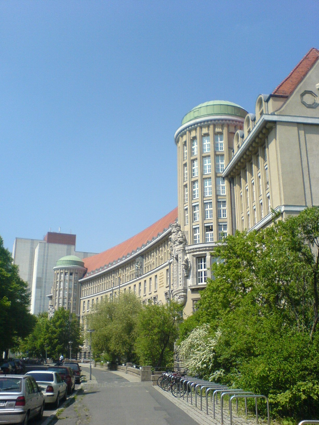 Deutsche Bücherei Leipzig – Hauptgebäude mit Bücherturm (German library Leipzig – main building with book tower)